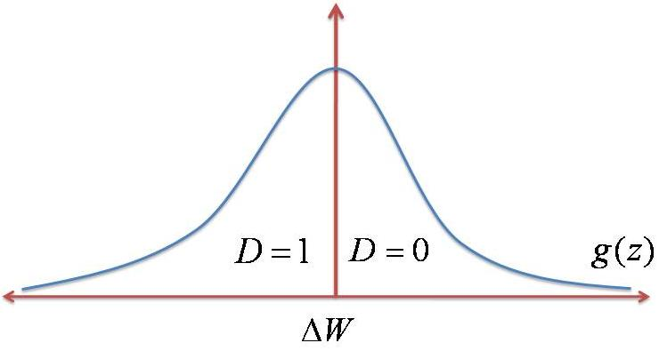 Distribución de la oferta